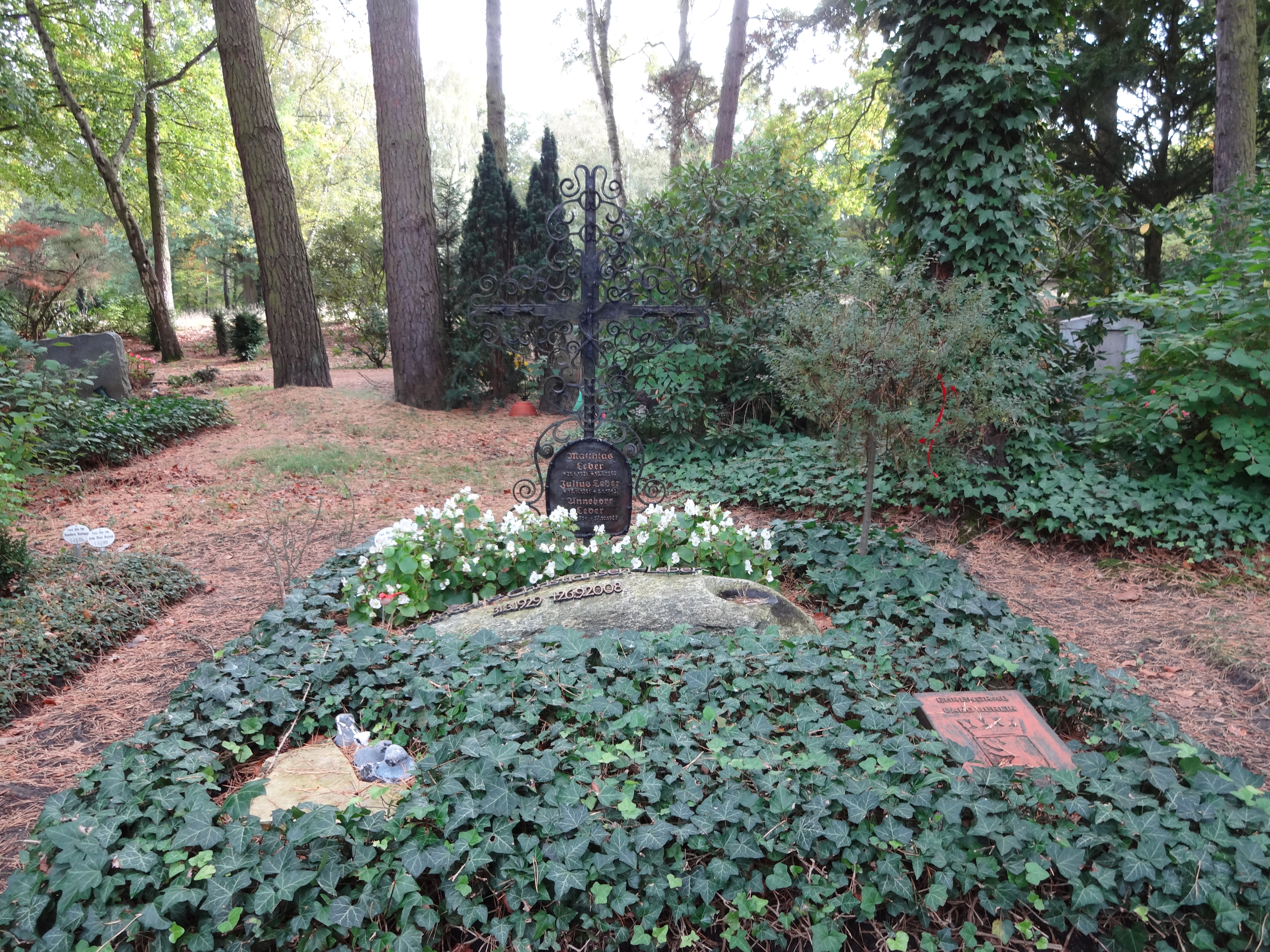 Grabstätte von Annedore Leber auf dem Waldfriedhof Zehlendorf; Ehrengrab der Stadt Berlin